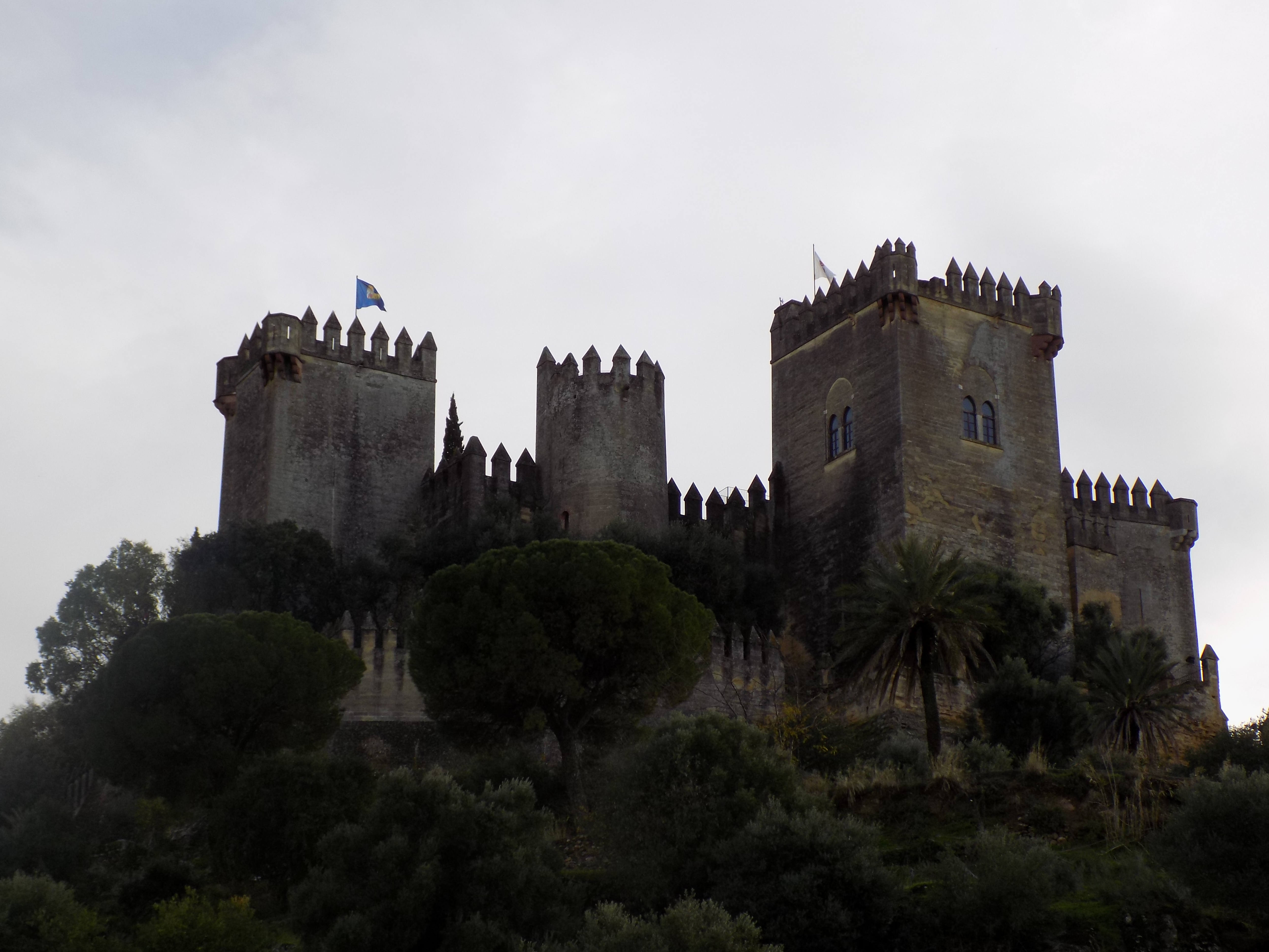 Exterior del castillo de Almodóvar del Río.